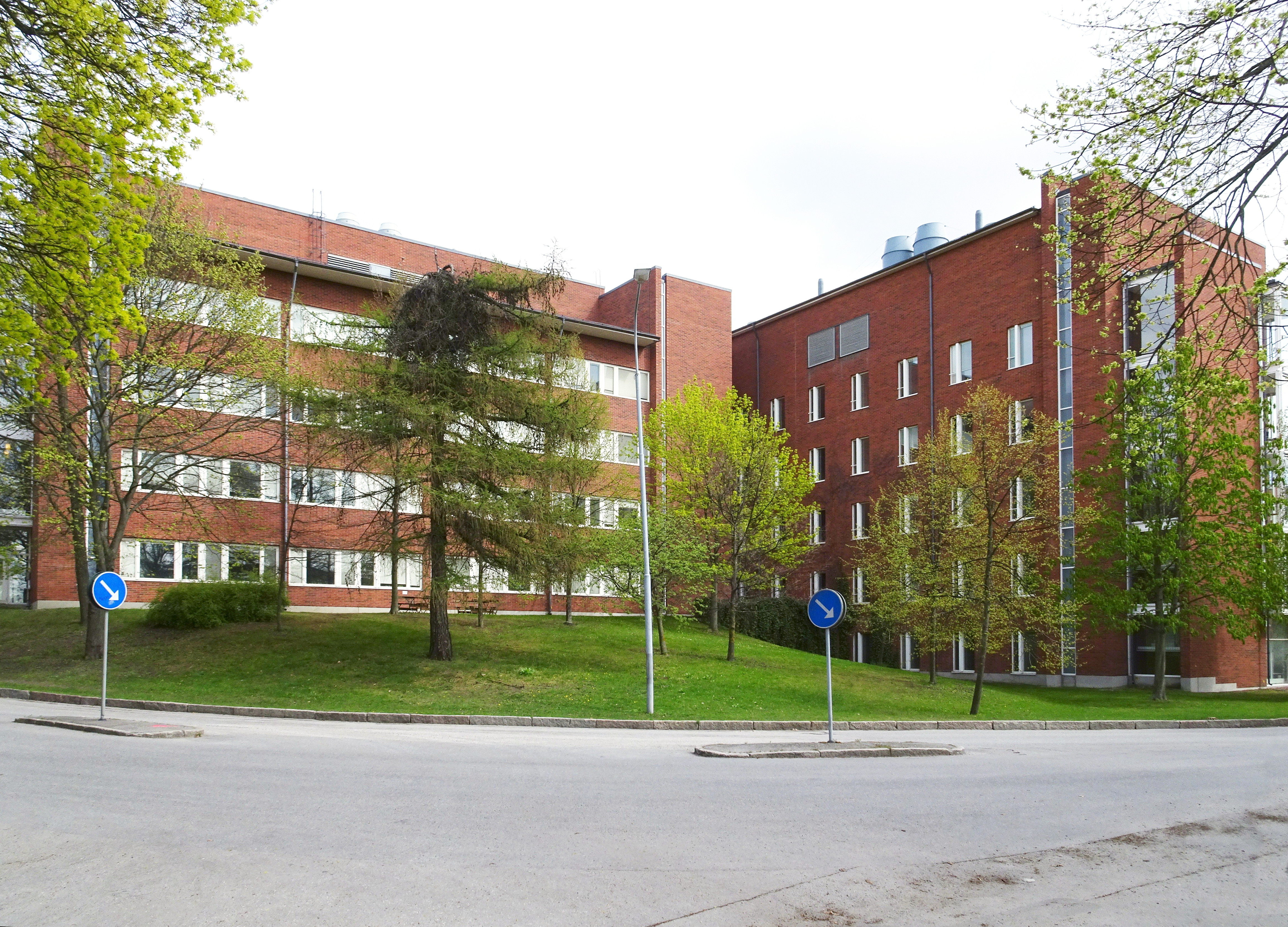 Retziuslaboratoriet, Retzius väg 8, byggår 2001, arkitekt Bjurström & Brodin arkitektkontor